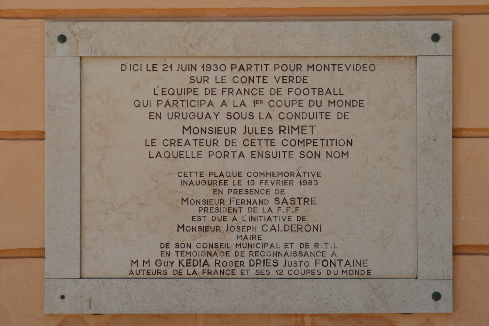 Villefranche - Commemoration